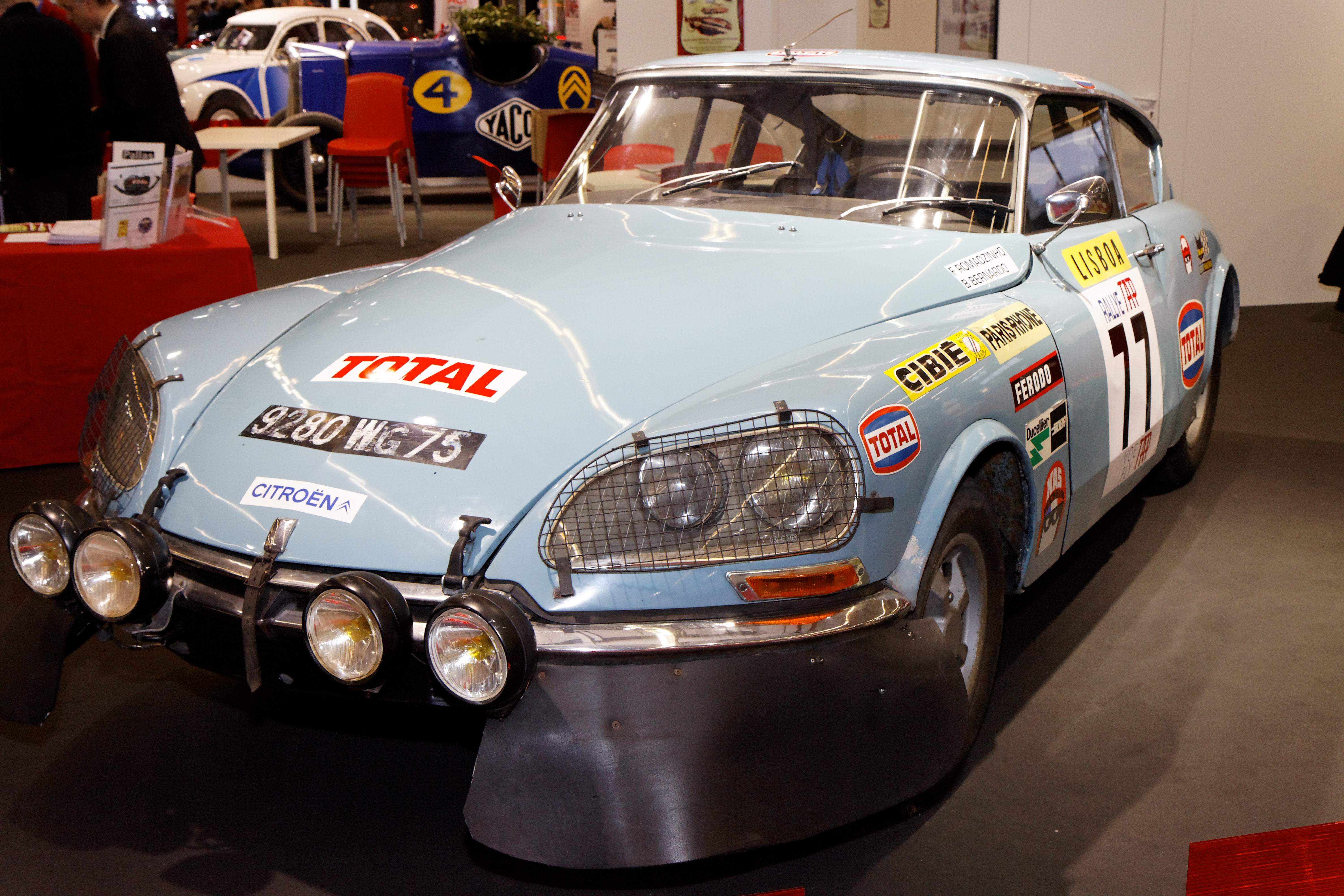 Photographie prise lors du salon rétromobile 2011 à Paris, porte de Versailles.